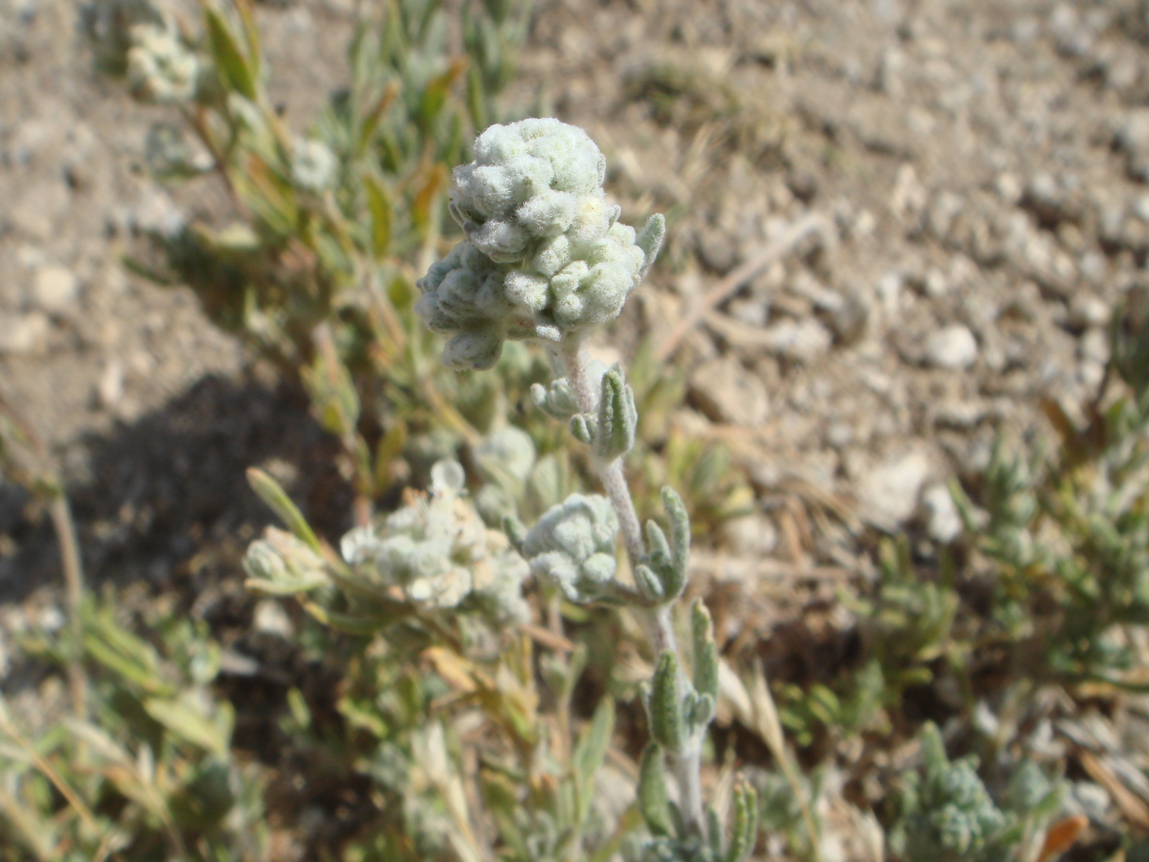 Teucrium capitatum, Paramera de Ávila, Villaviciosa (Ávila), España